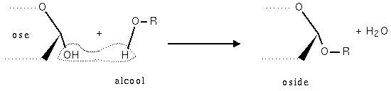 Formation d'un oside. Mars 2005 Création personnelle.